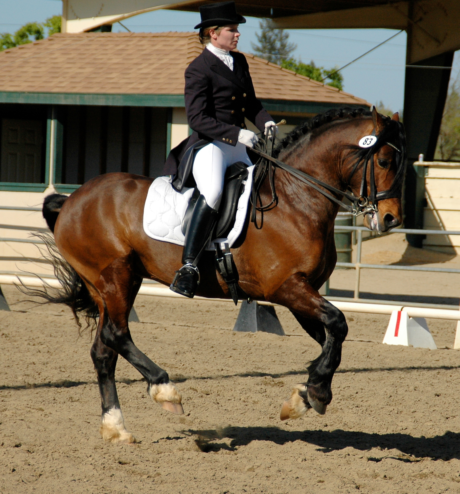 Welsh Cob, fliegender Galloppwechsel